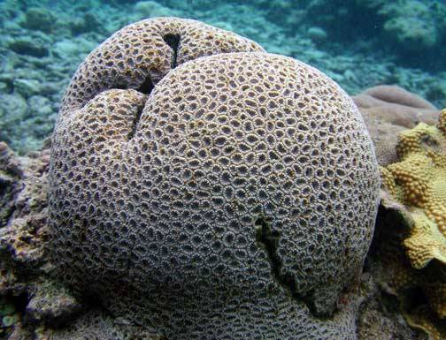 Leptastrea transversa en Samoa Americana